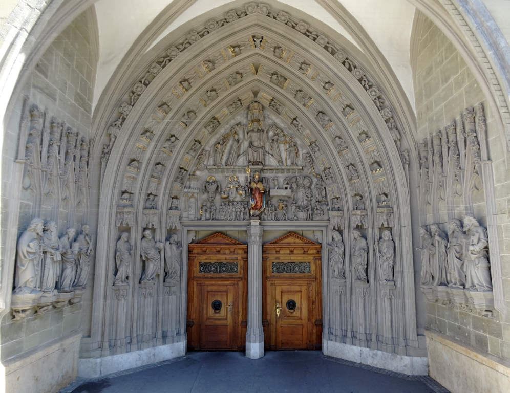 Cathédrale St-Nicolas de Fribourg (Suisse). Portail principal.